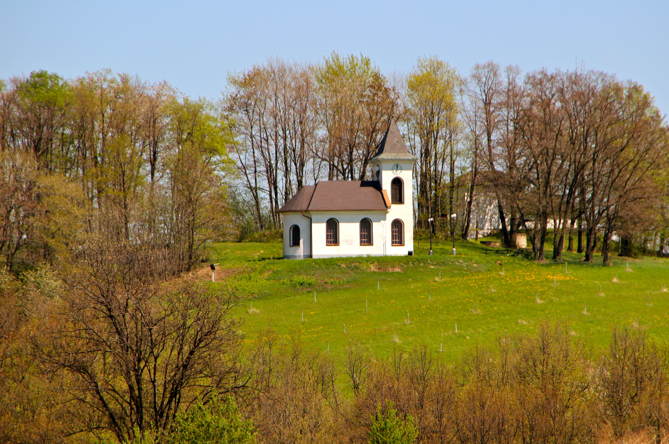 Kaplica w Rusínie – wieś w Czechach, w powiecie Bruntál, w kraju morawsko-śląskim.